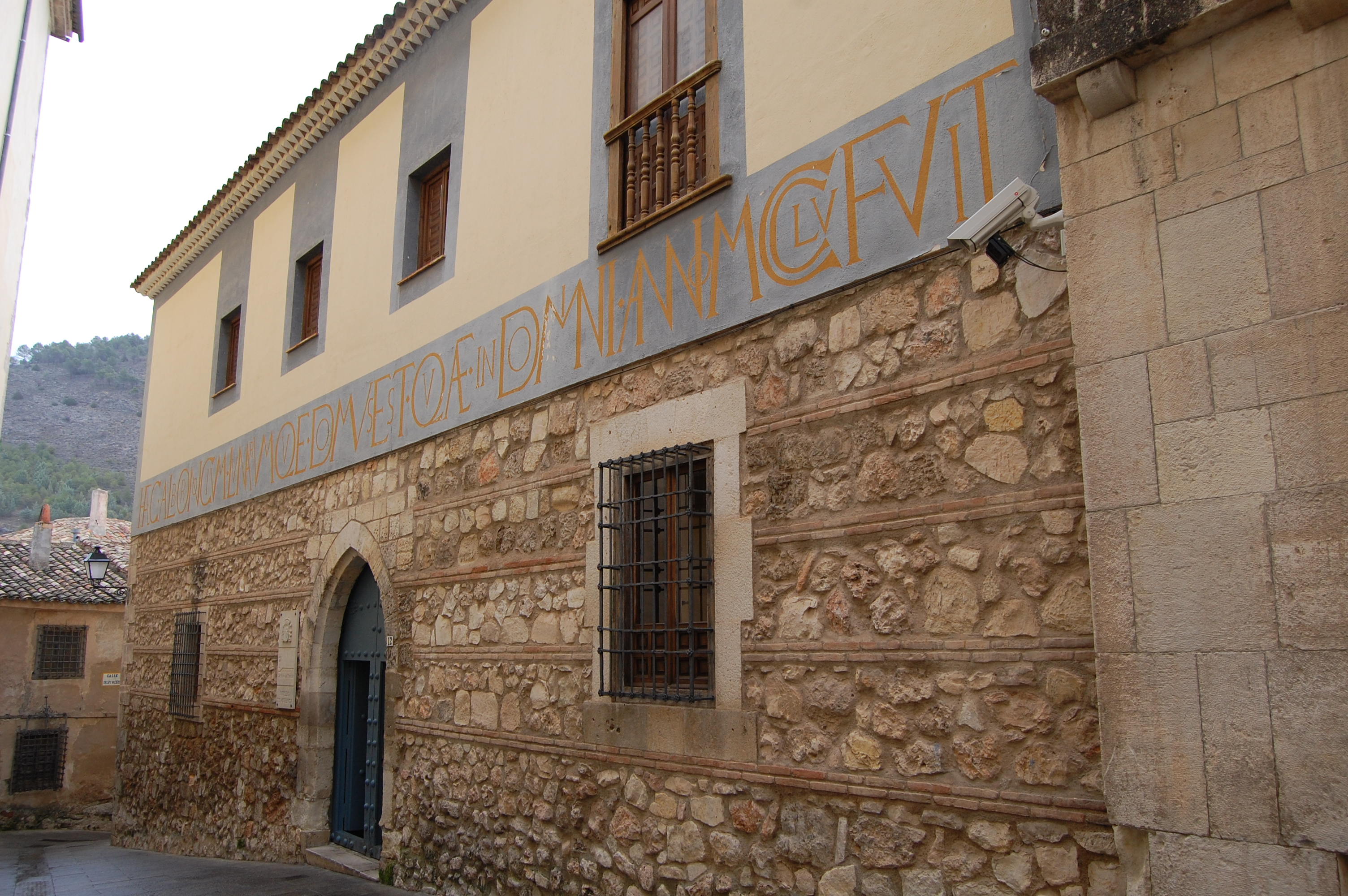 Casa de la familia Albornoz y Luna en Cuenca, llamada del Curato.